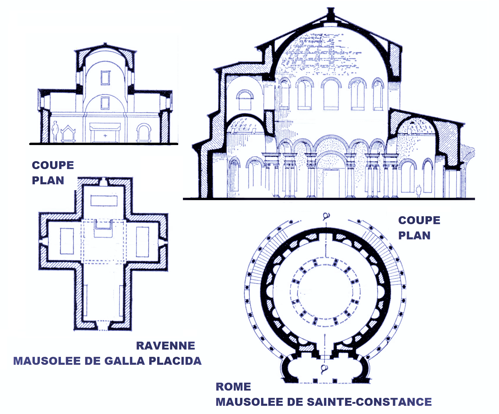 Mausolées de Sainte-Contance à Rome et Galla Placida à Ravenne, plans et coupes (image Commons modifiée)